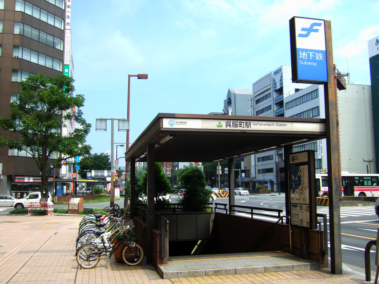 福岡市地下鉄呉服町駅